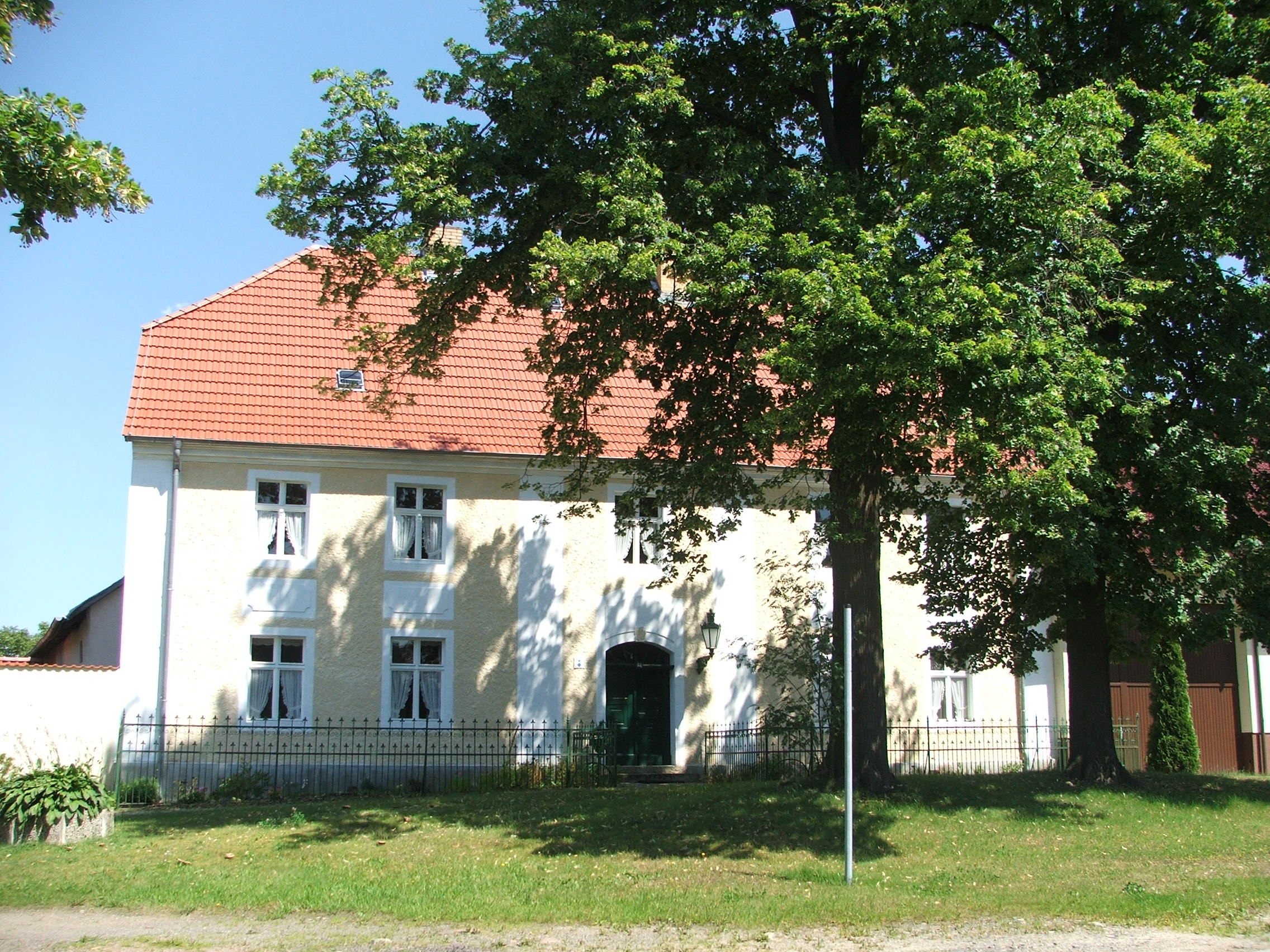 Hohenbucko altes Haus, ehemals Bibliothek